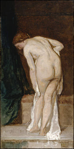 Mujer saliendo del baño de Eduardo Rosales. Museo del Prado.